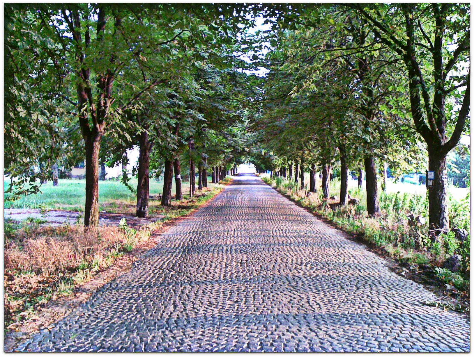 Алексиначки Рудник